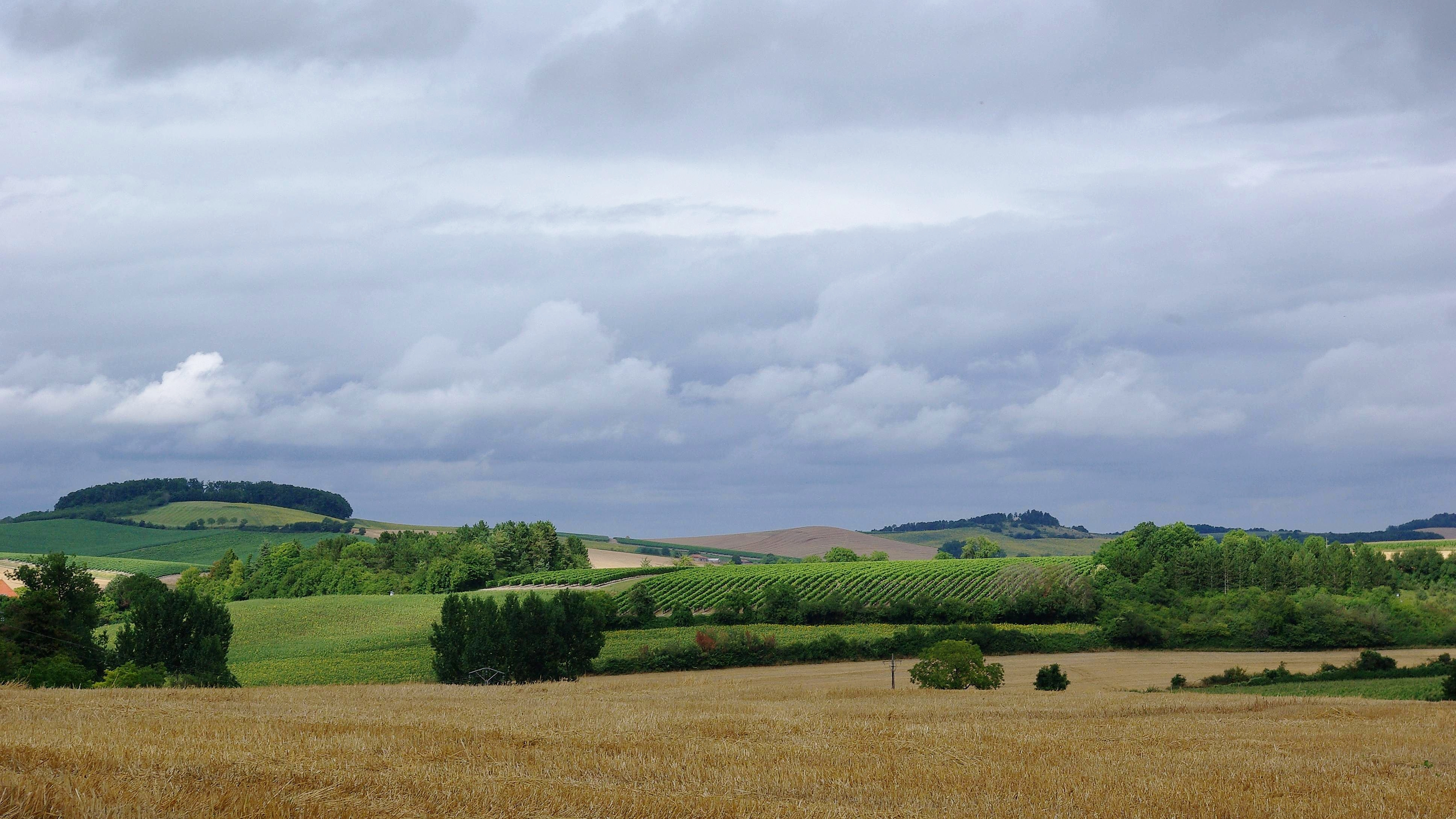 Paysage du Blanzacais : collines et polyculture avec prédominance du vignoble. Vue prise près du logis du Luc sur la commune de Champagne-Vigny, Charente, France.